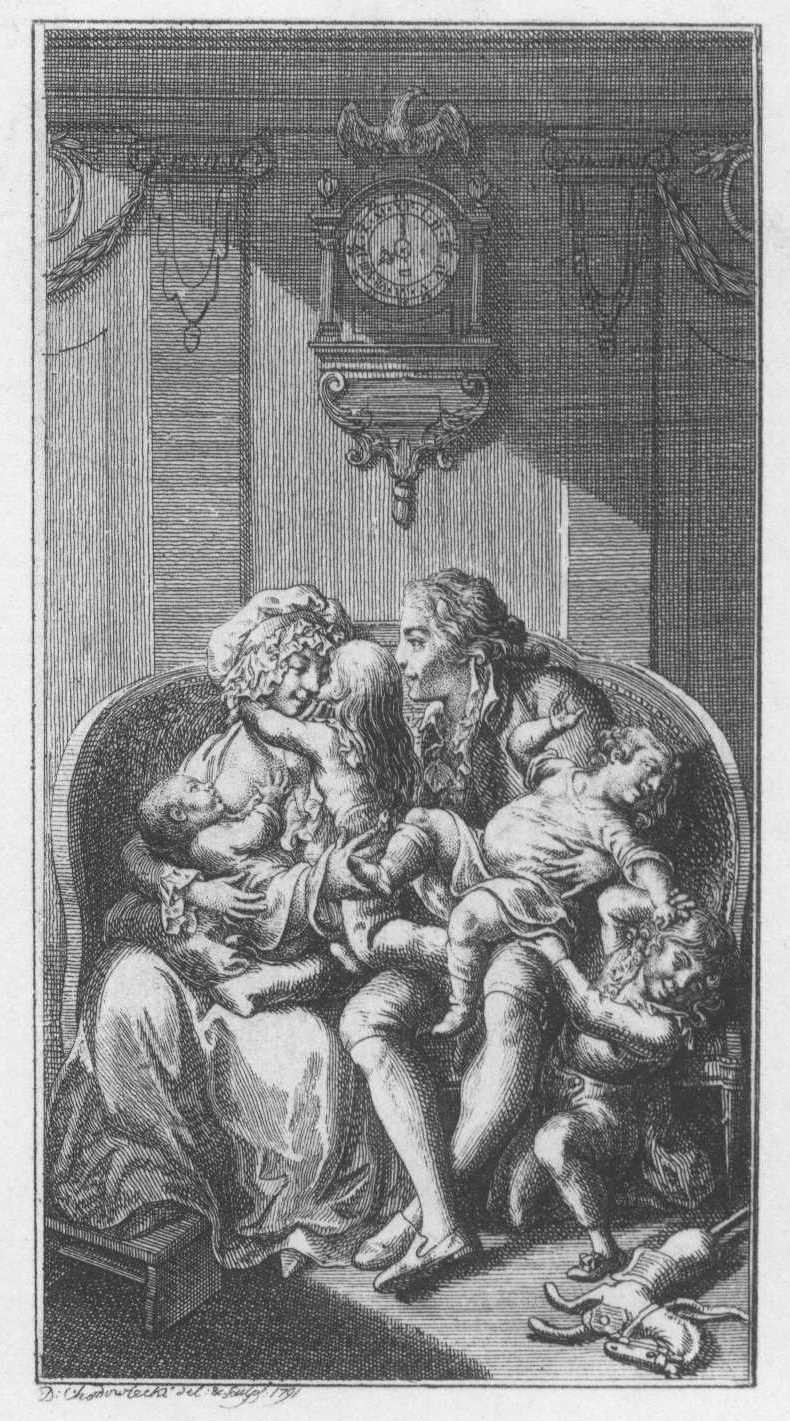 Titelkupfer zu Hippel's Ehe. (Beschreibung lt. Quelle)